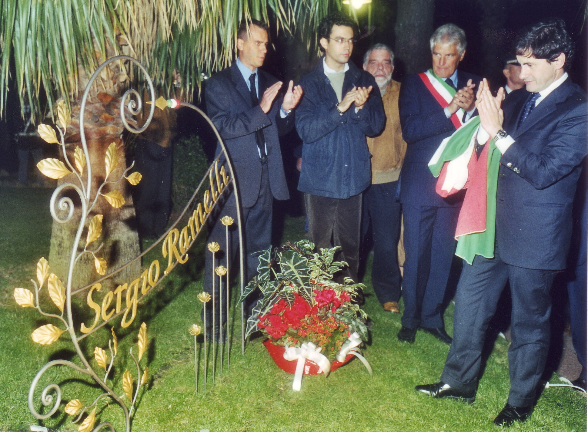 Il ministro dell'agricoltura Gianni Alemanno a Ospedaletti nel 2002 all'inaugurazione del cippo per Sergio Ramelli